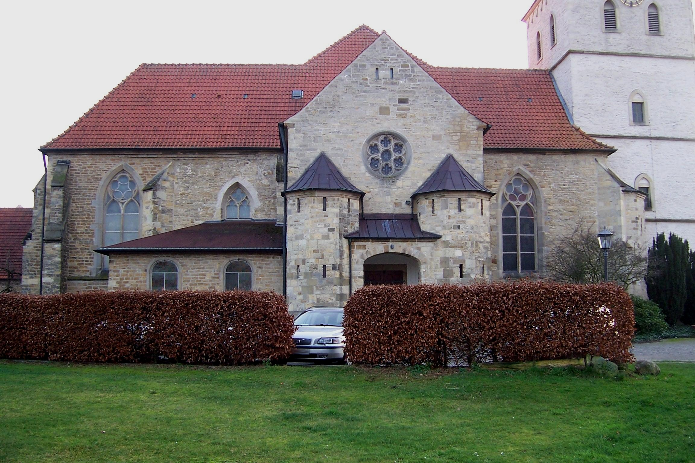 Alter Teil der Kirche in Horstmar-Leer, Kreis Steinfurt, NRW, Germany.